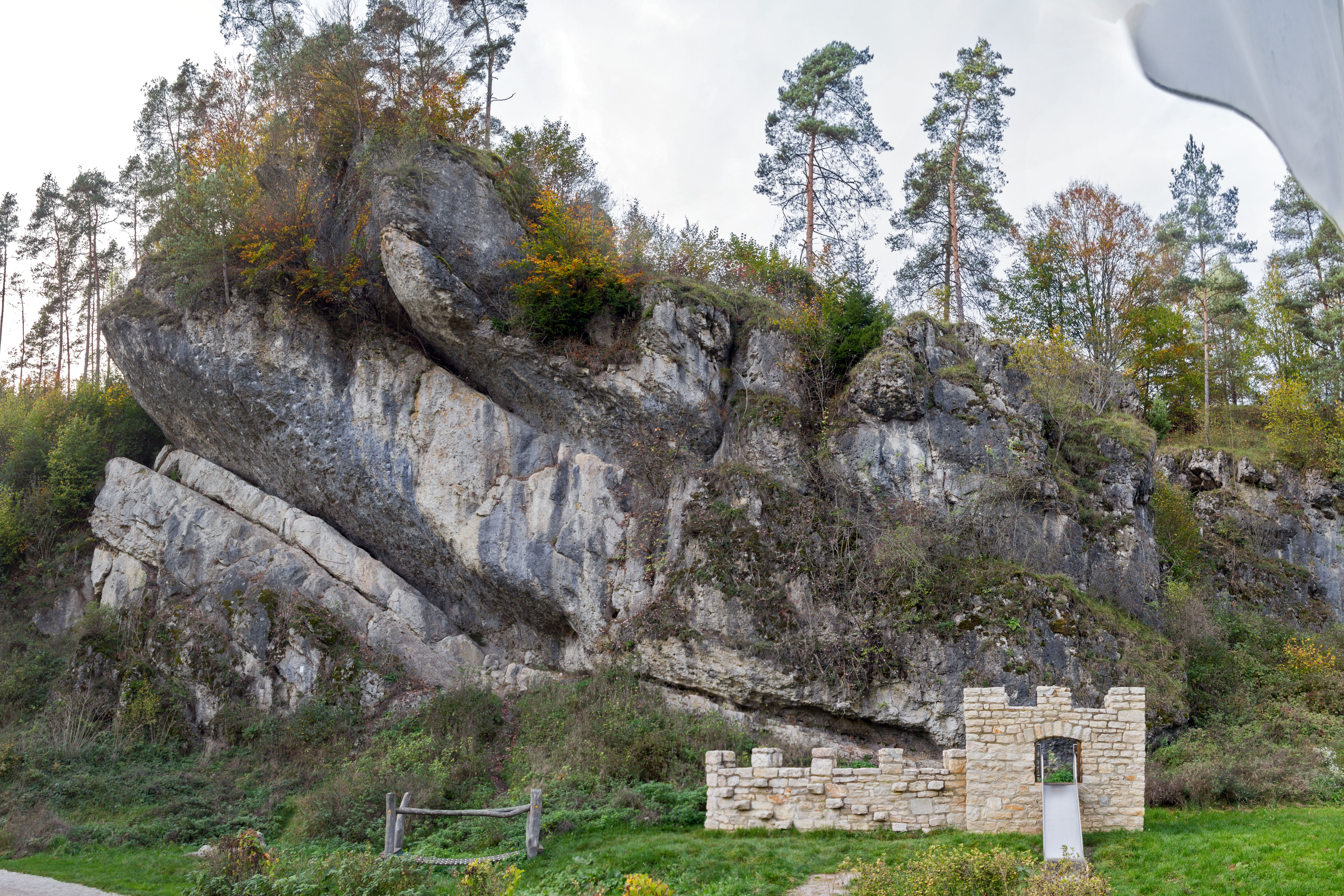 Felsen, Plechstein, Geotop, Trubachtal